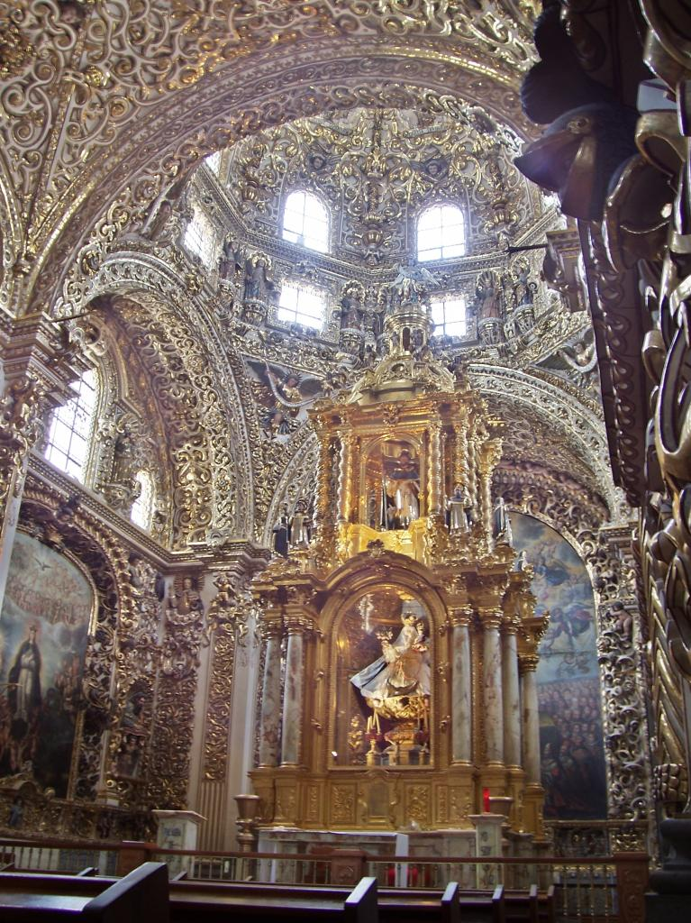 Interior de la Capilla de Nuestra Señora del Rosario, Ciudad de Puebla, Puebla en México, composición hdr